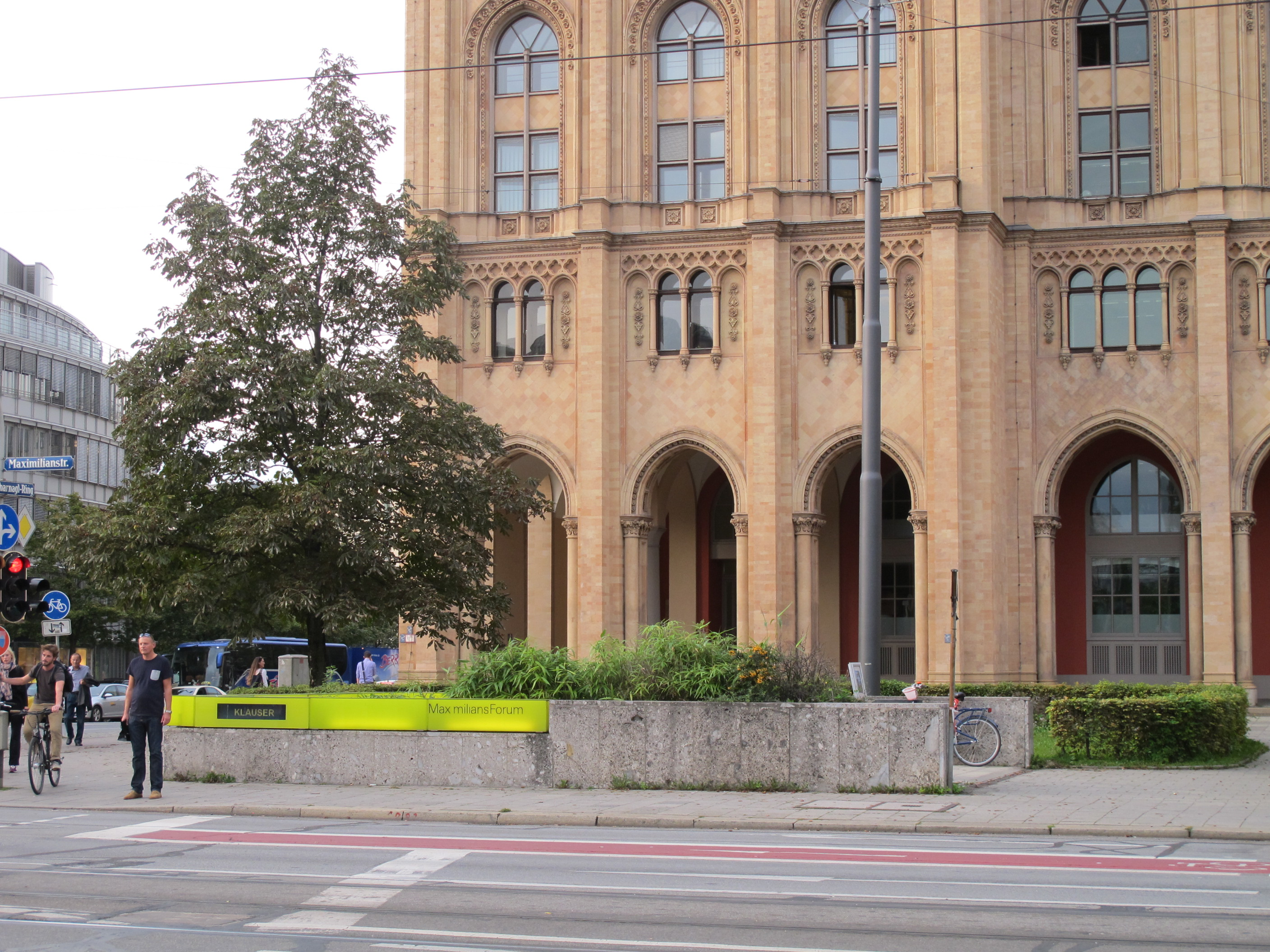 Maximiliansforum Semptember 2014